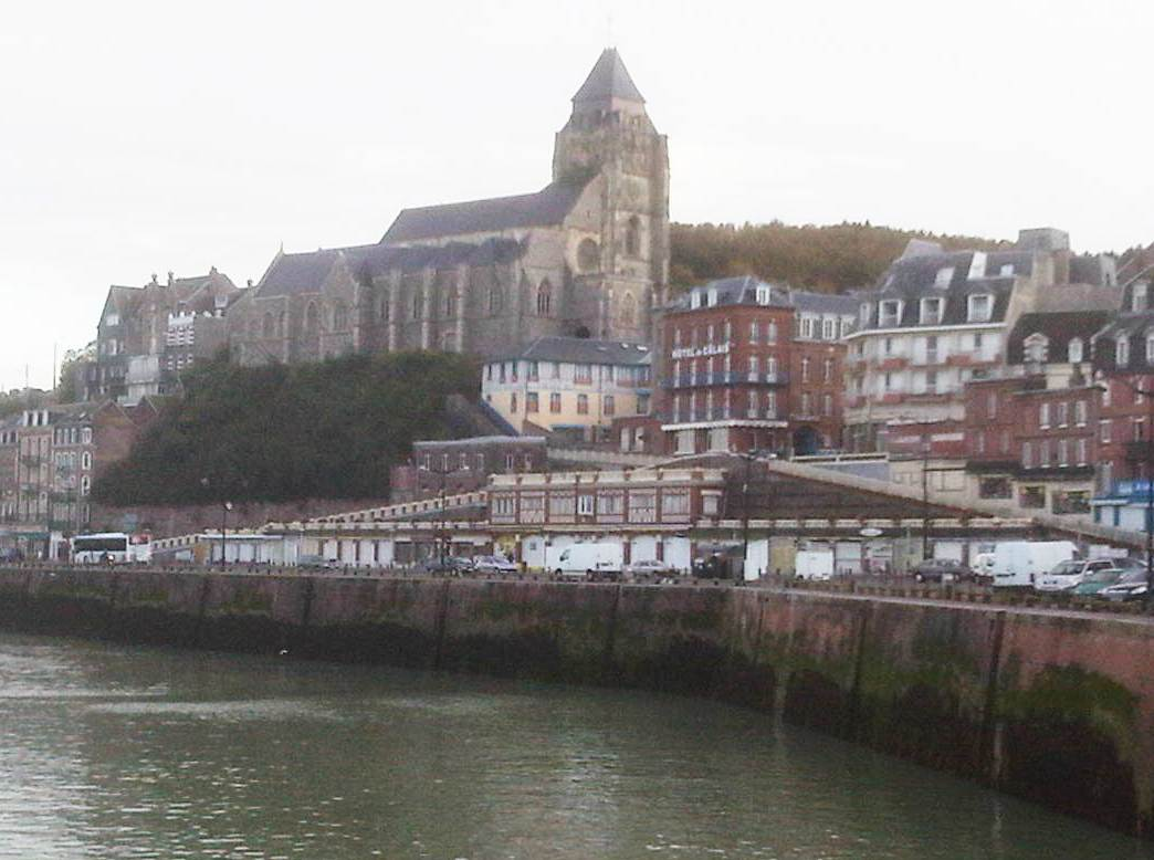 Le tréport